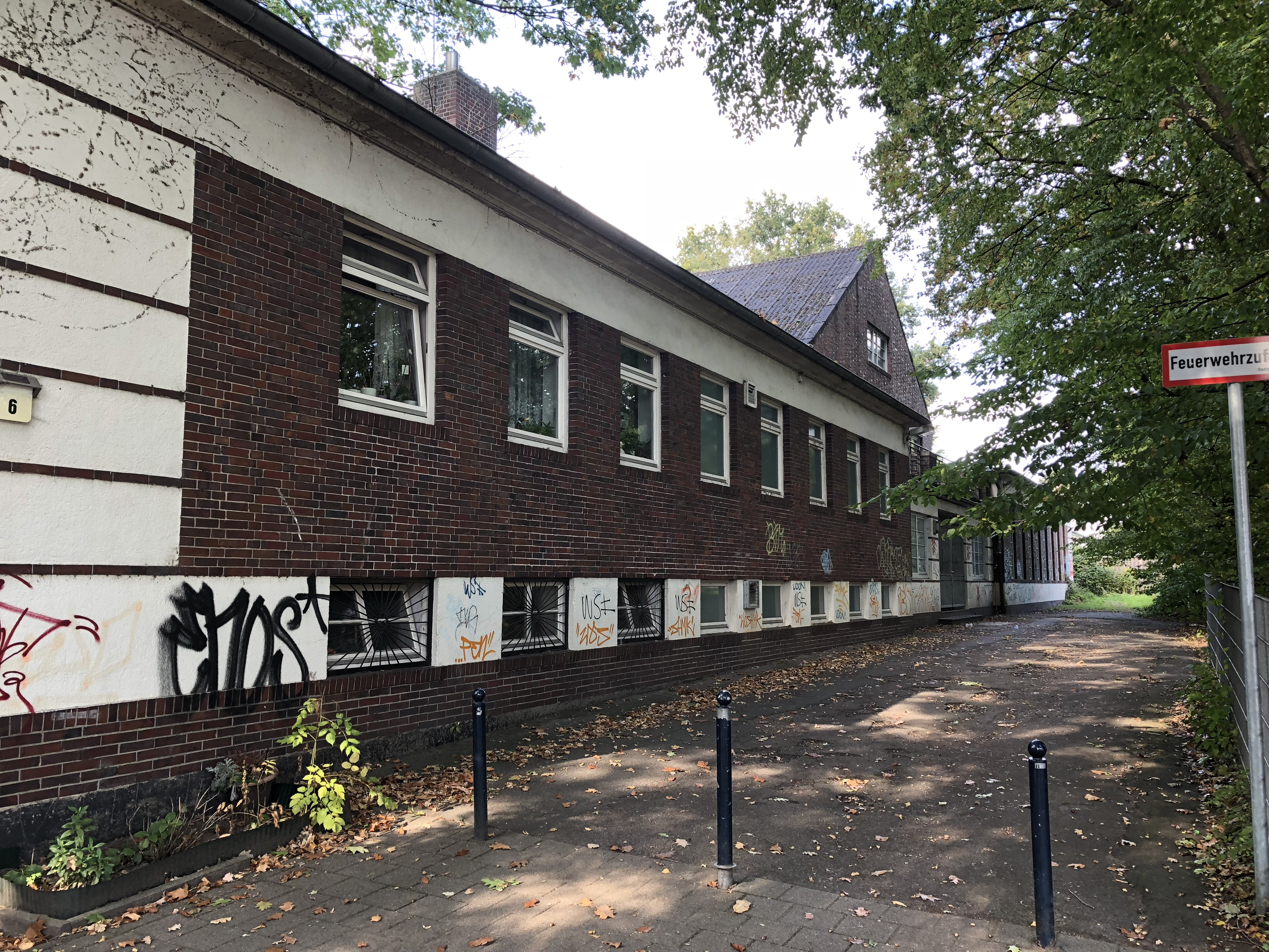 Turnhalle in Bremen, Ludwig-Jahn-Straße 6Das abgebildete Objekt ist ein geschütztes Kulturdenkmal in der Freien Hansestadt Bremen, mit der Nr. 2207 beim Landesamt für Denkmalpflege registriert.